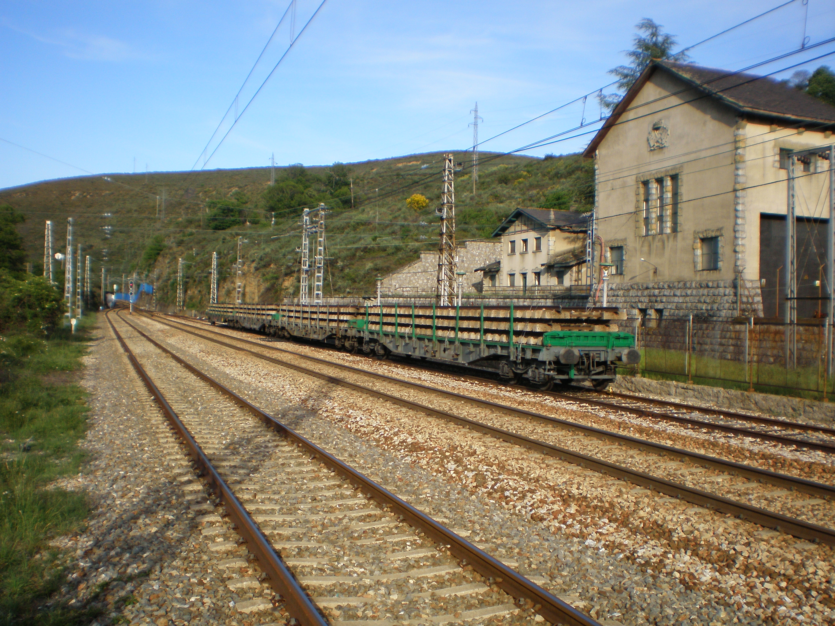 Salida de la estación de La Granja hacia Brañuelas y León, donde vemos un corte de vagones cargados con secciones de vías y traviesas estacionado en una vía de apartado, junto a la subestación eléctrica (Torre del Bierzo, comarca de El Bierzo, provincia de León, Castilla y León).